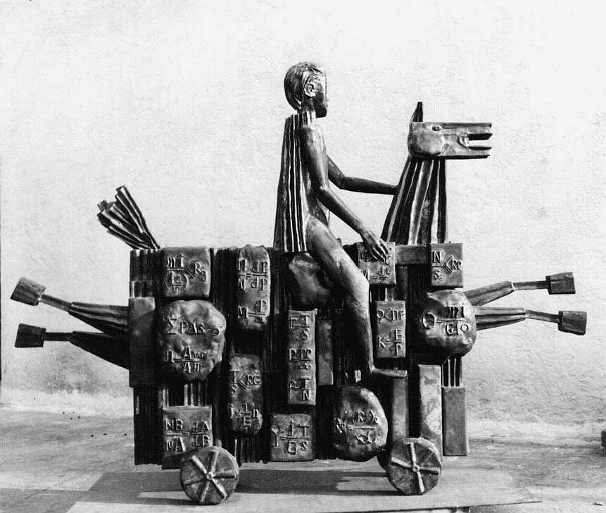 Le cheval mécanique fer forgé galvanisé, H2,10 L2,75, 1962, artiste: Jean Vincent de Crozals